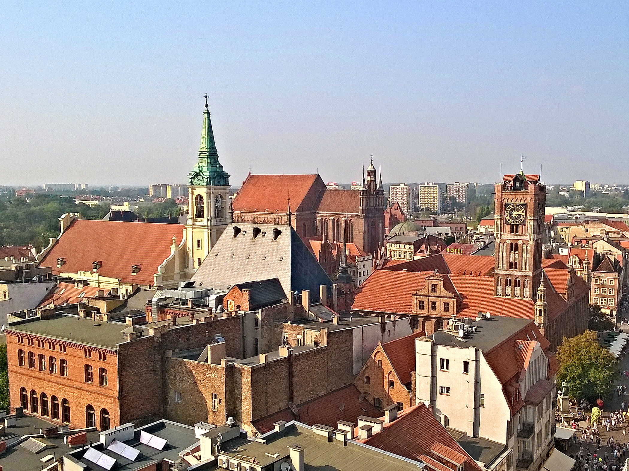 Zespół Staromiejski Torunia, wpisany na Listę Światowego Dziedzictwa Kultury UNESCO